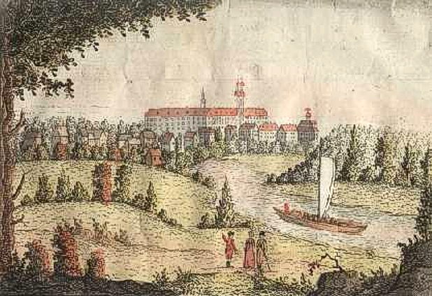 de: Das Kloster Leubus und die Oder von Norden. en: The abbey of Lubiąż and the Oder-river from the north. pl: Klasztor w Lubiążu i Odra z północy.